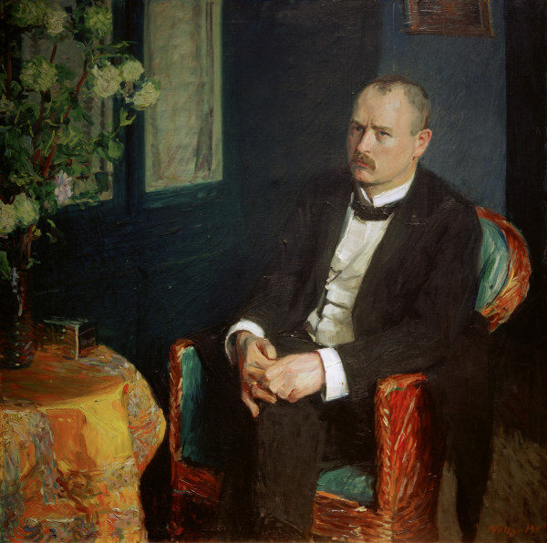 Bildnis Ernst Rump, 1905